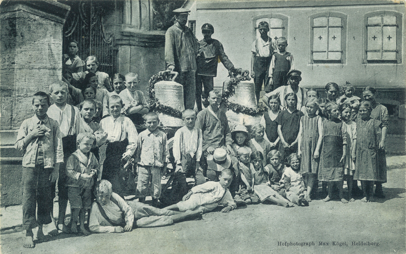 Die Glocken der evangelischen Kirche in Eschelbronn aus den Jahren 1833 und 1863 werden zur Einschmelzung für die Kriegsrüstung abgegeben. (Heimat- und Verkehrsverein Eschelbronn: Eschelbronn - Deine Heimat, 1957, Seite 80)